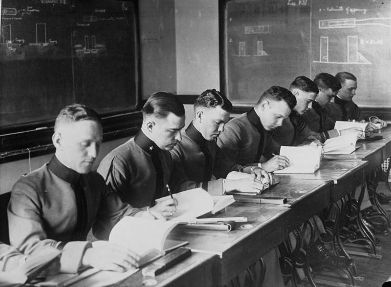 Die berühmte amerikanische Offiziersschule in West-Point, welche nach deutschem Muster eingerichtet ist. Die zukünftigen Offiziere der amerikanischen Armee erhalten hier eine vollständig militärische Ausbildung. Zukünftige Offiziere der amerikanischen Armee in der Kadetten-Uniform während eines Unterrichtes in West Point.